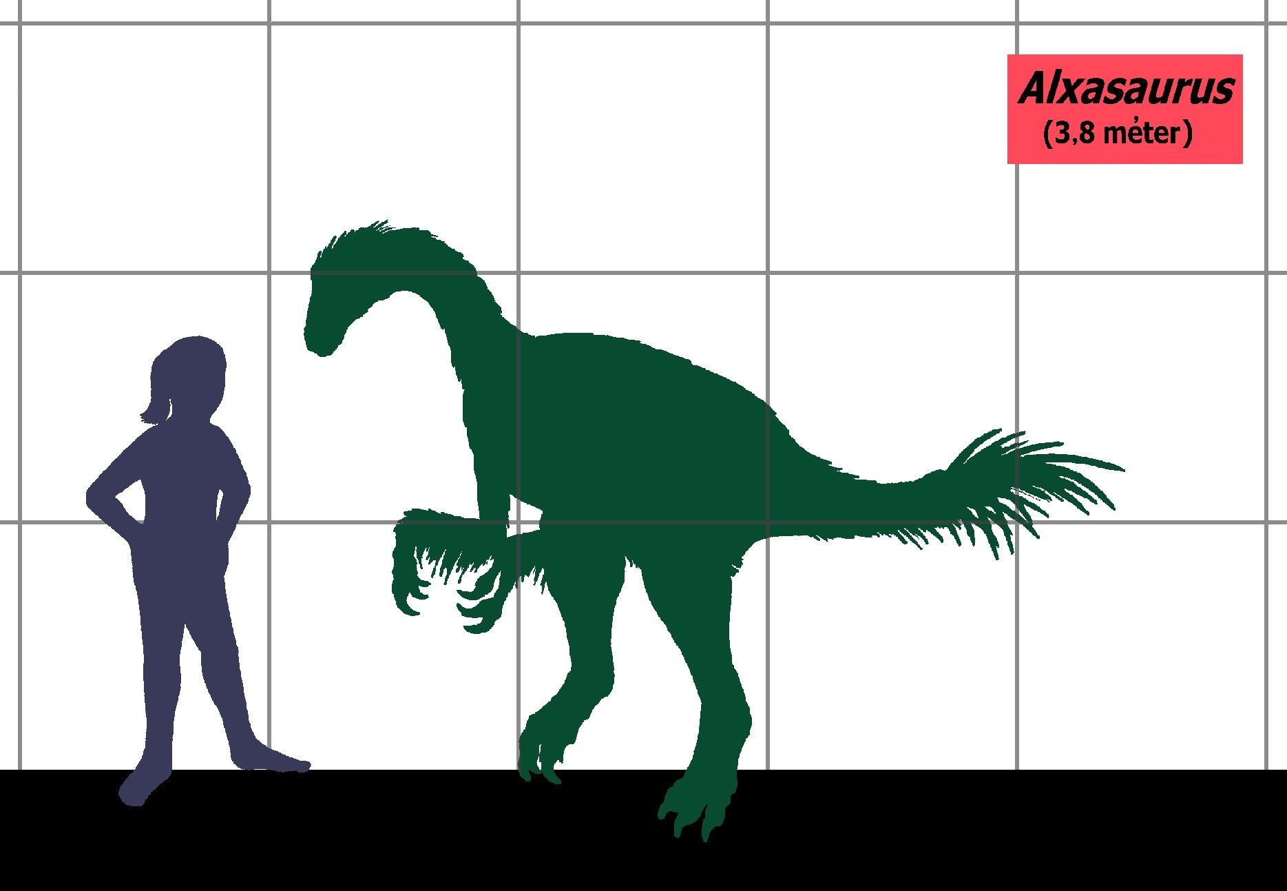 Az Alxasaurus mérete